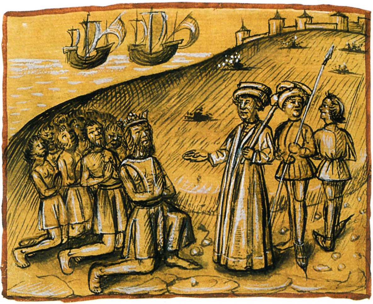 Abbildung zu Beginn des 46. Kapitels des Le Canarien Version B „Wie der König von Lanzarote den Herren Béthencourt bittet getauft zu werden”